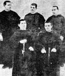 Padresagustinos